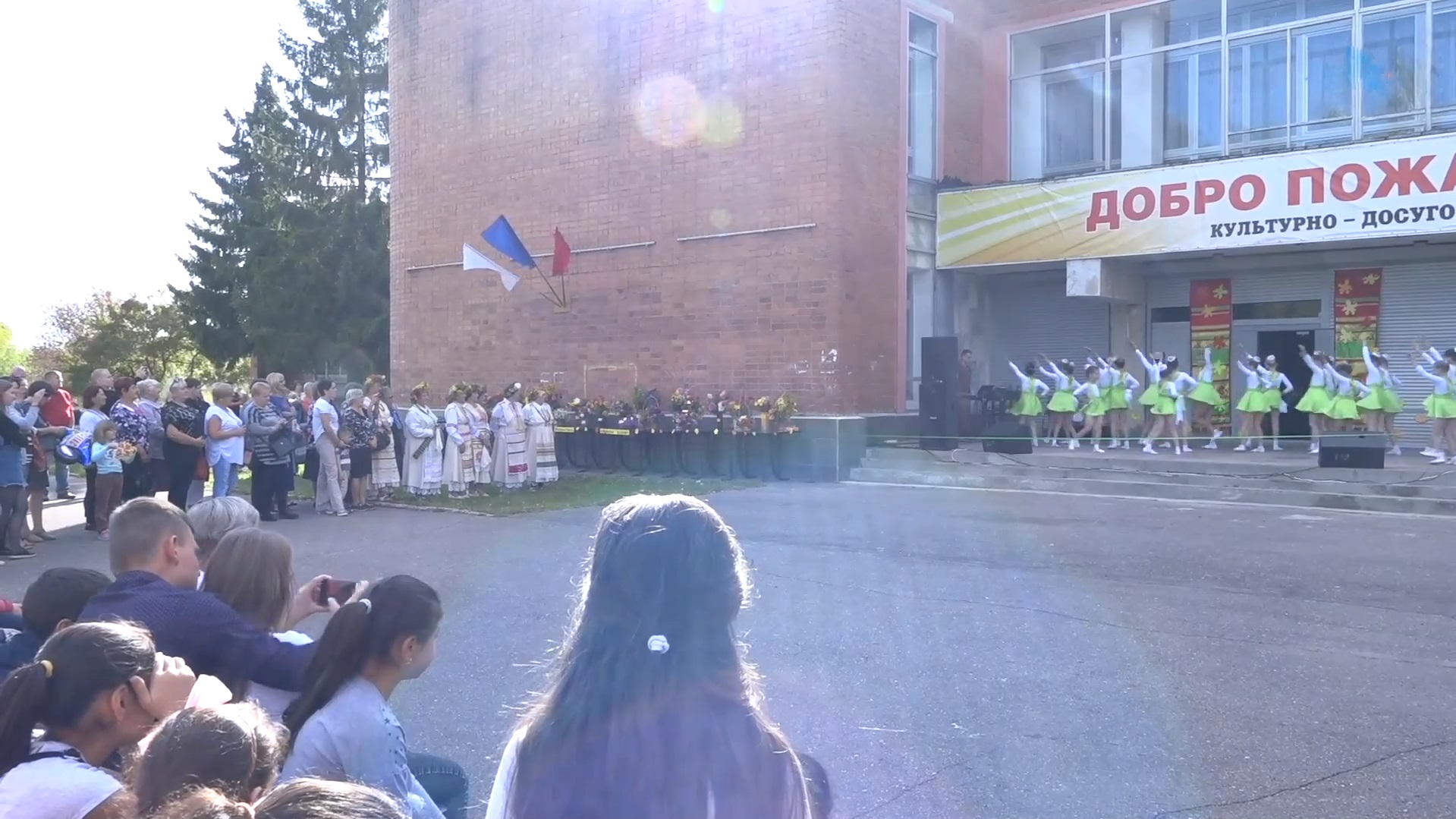 Праздник наступающей осени в селе Шурскол 15.09.2018